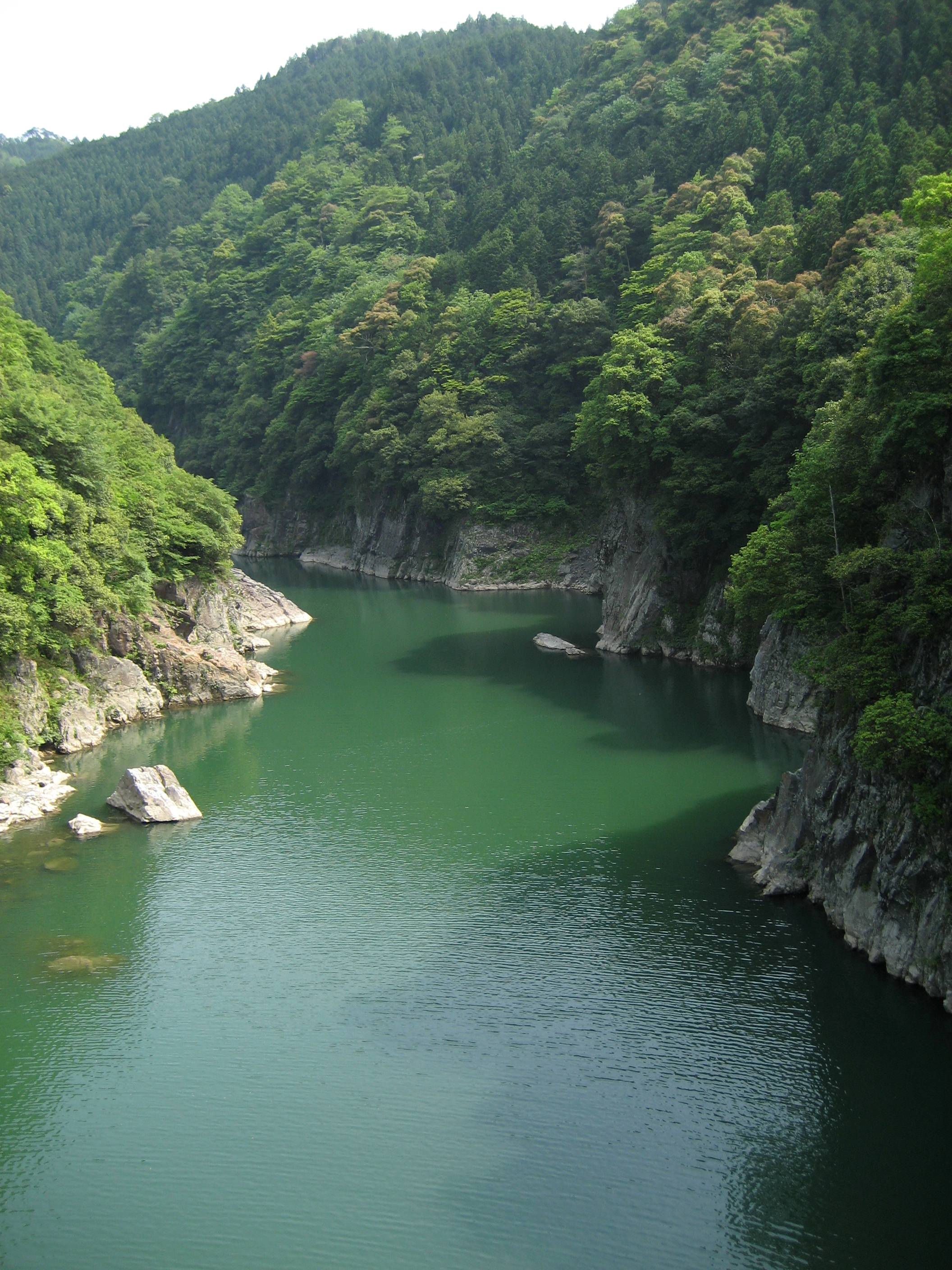 Sosuikyo river (蘇水峡)